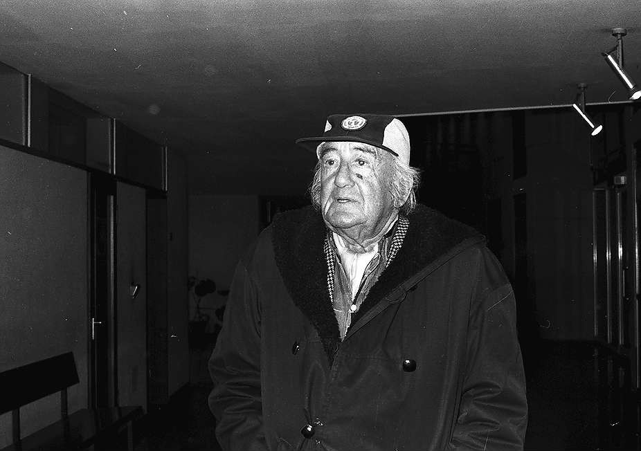 Freiburg im Breisgau: Regisseur Dr. Harald Reinl, Zeuge bei der Verhandlung der Unterlassungsklage von Leni Riefenstahl gegen Nina Gladitz vor dem Landgericht.